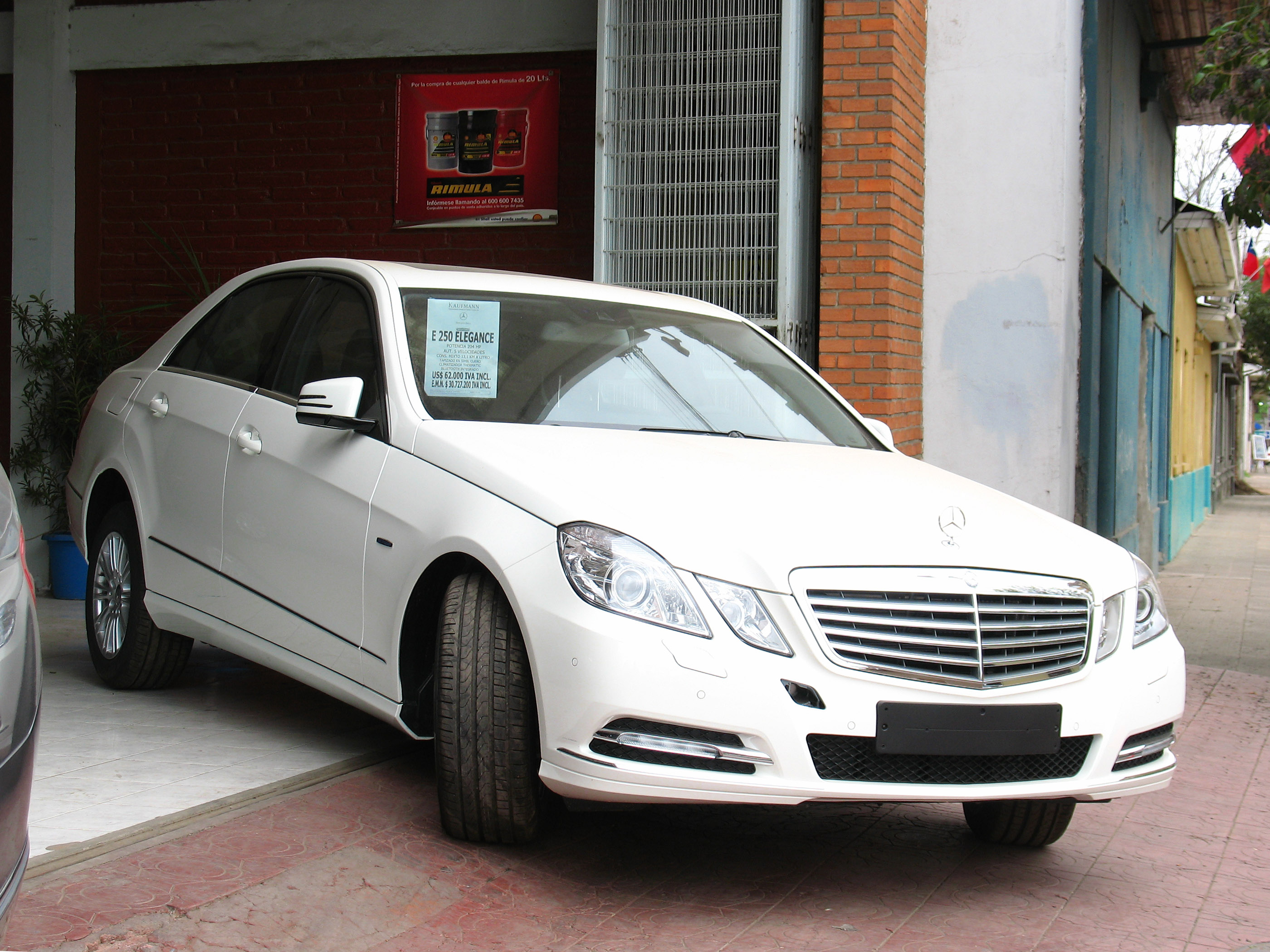 Mercedes Benz E 250 CGi Elegance 2010